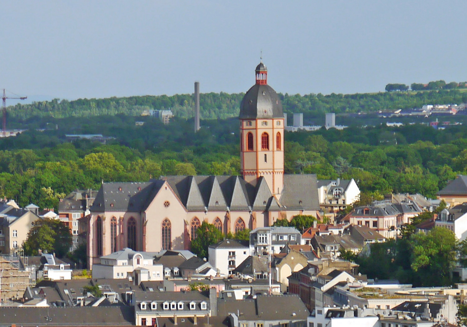 Die katholische Pfarrkirche Sankt Stephan in Mainz, 2015 vom Bonifaziusturm A.